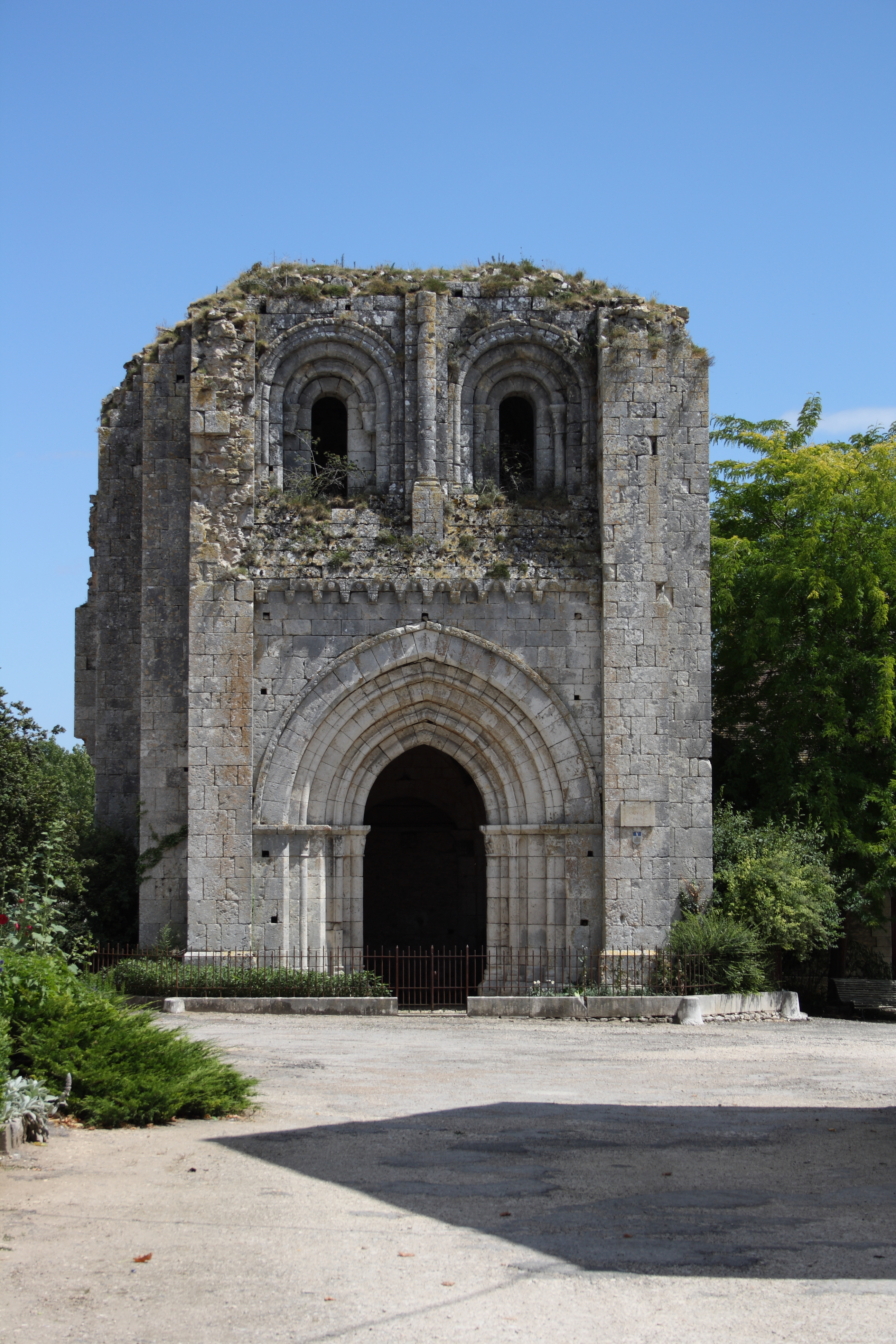 Ehemaliges Priorat Saint-André in Château-Landon, einer Gemeinde im Département Seine-et-Marne (Île-de-France), aus der Mitte des 12. Jahrhunderts